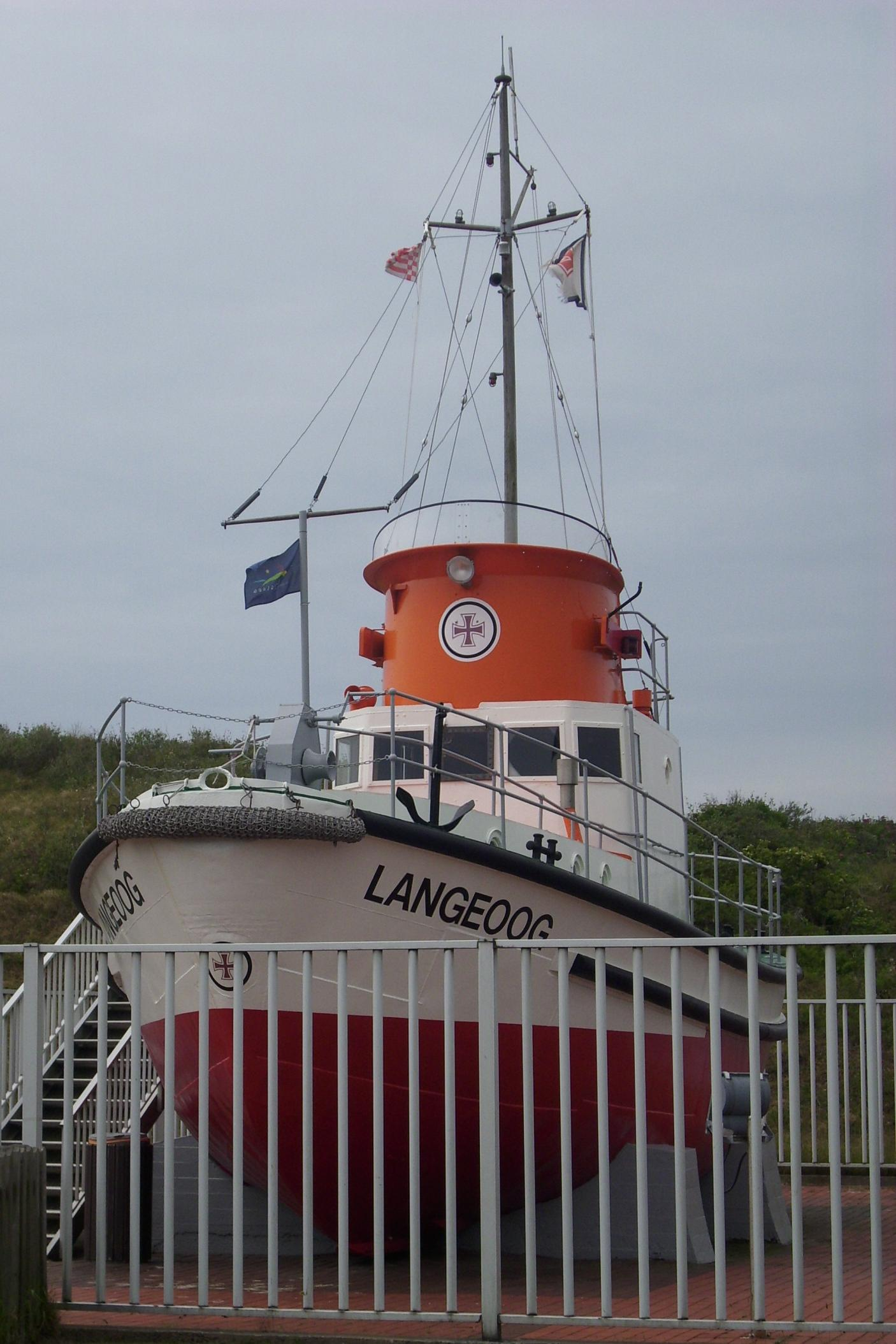 Motorrettungsboot Langeoog der DGzRS im Inseldorf auf Langeoog